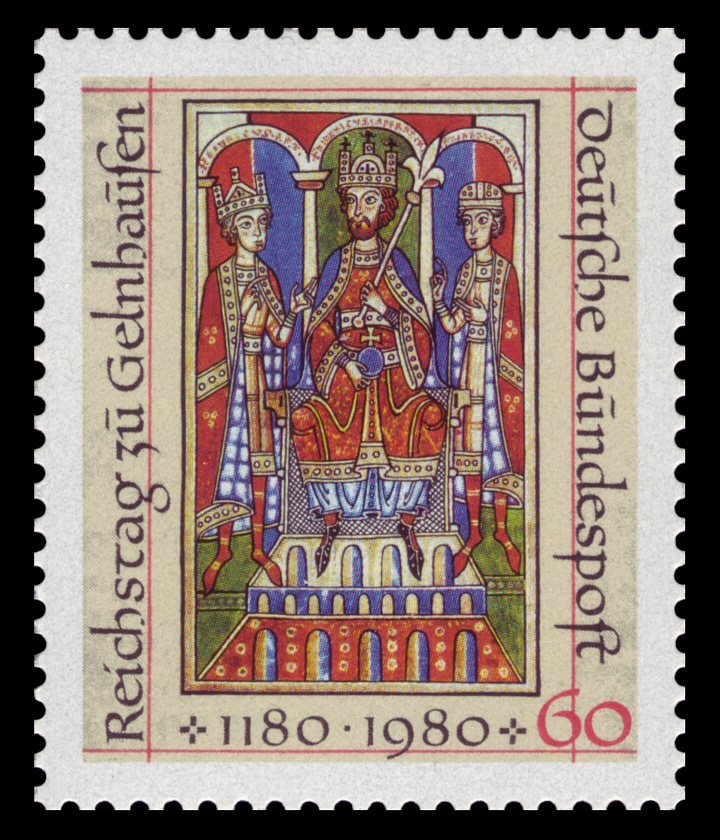 800. Jahrestag des Hoftags zu Gelnhausen Graphics by Walter Ausgabepreis: 60 Pfennig First Day of Issue / Erstausgabetag: 10. April 1980 Michel-Katalog-Nr: 1045